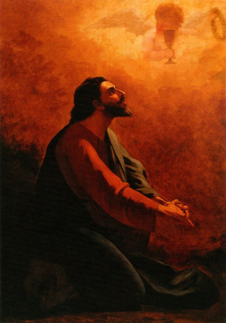 Almeida Júnior - Cristo no Horto, 1882-85. Óleo sobre tela, 157 x 107 cm. Igreja Nossa Senhora Candelária, Itu, SP.